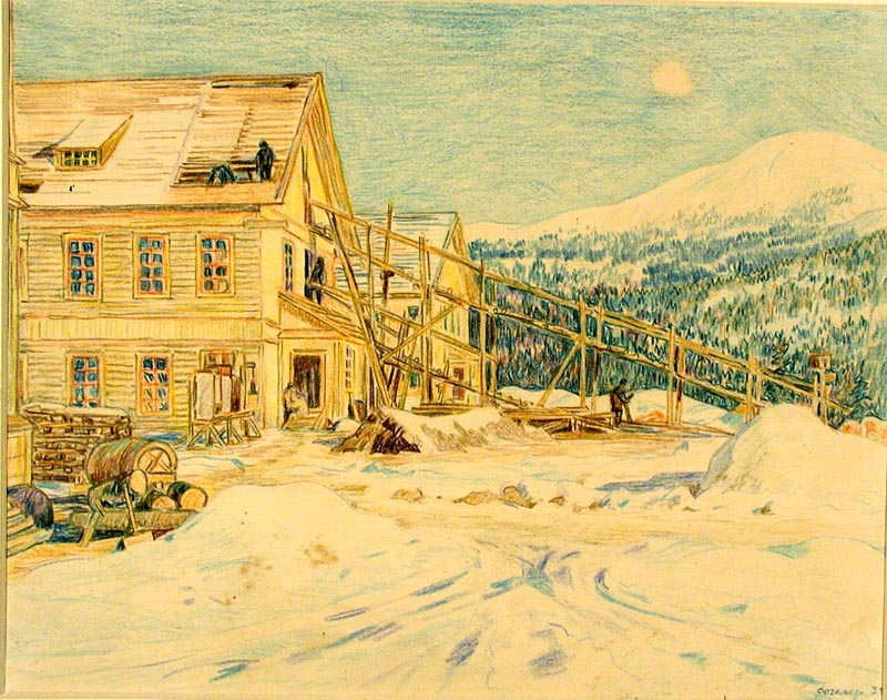 Фогелер Г. Кандалакша. 1934 гг.